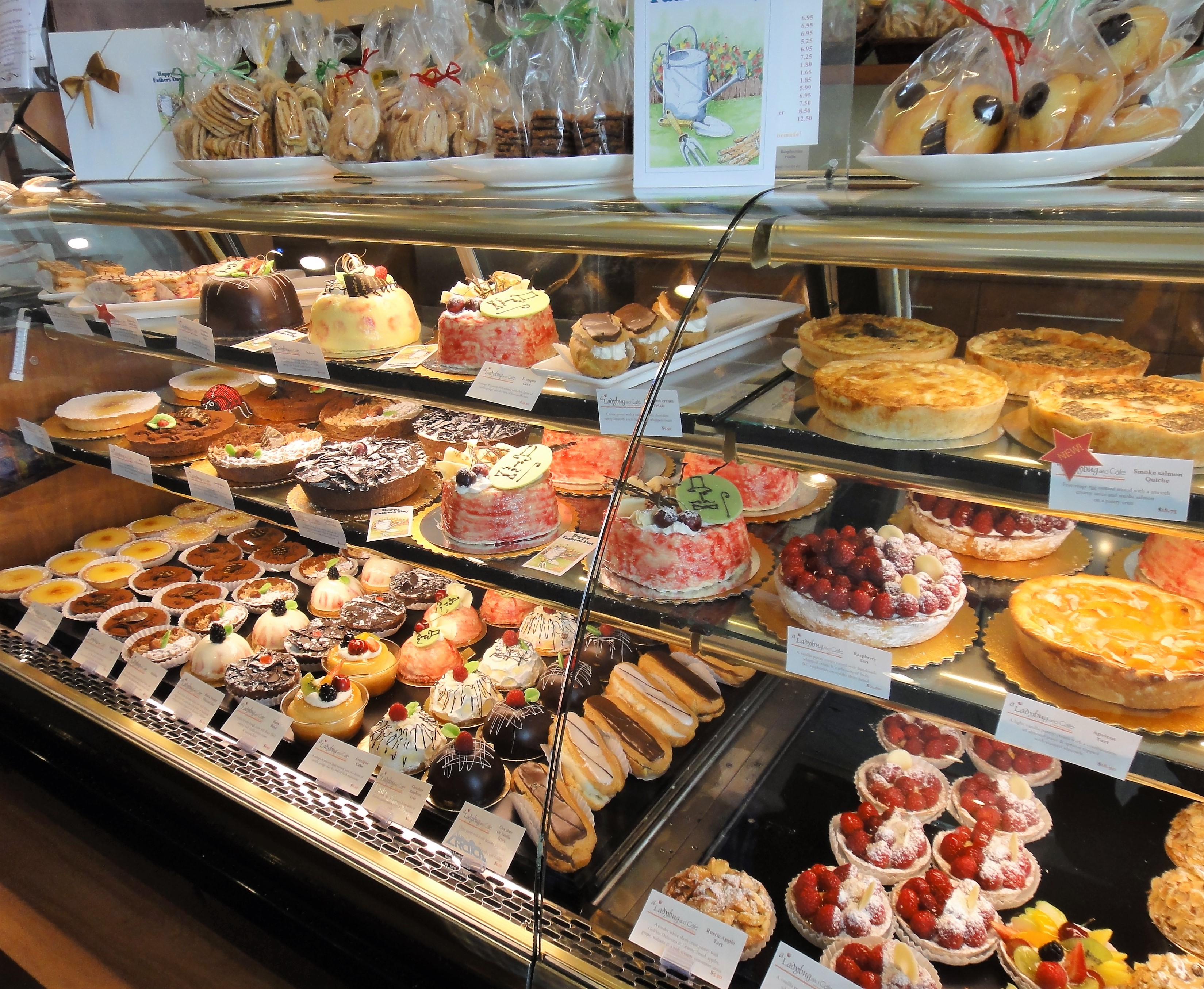 Auslagen einer Konditorei (A Ladybug Bakery & Cafe) in Calgary, Provinz Alberta, Kanada.